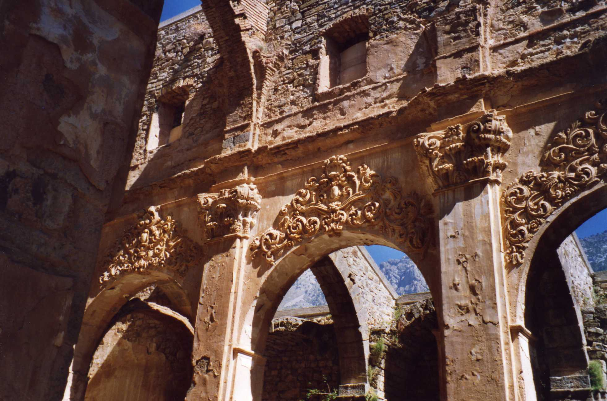 El interior de la iglesia del Monasterio de San Victorián en verano del año 2000. Como se puede ver, la completa ausencia de tejado dejaba totalmente a la intemperie los relieves barrocos de sus paredes.